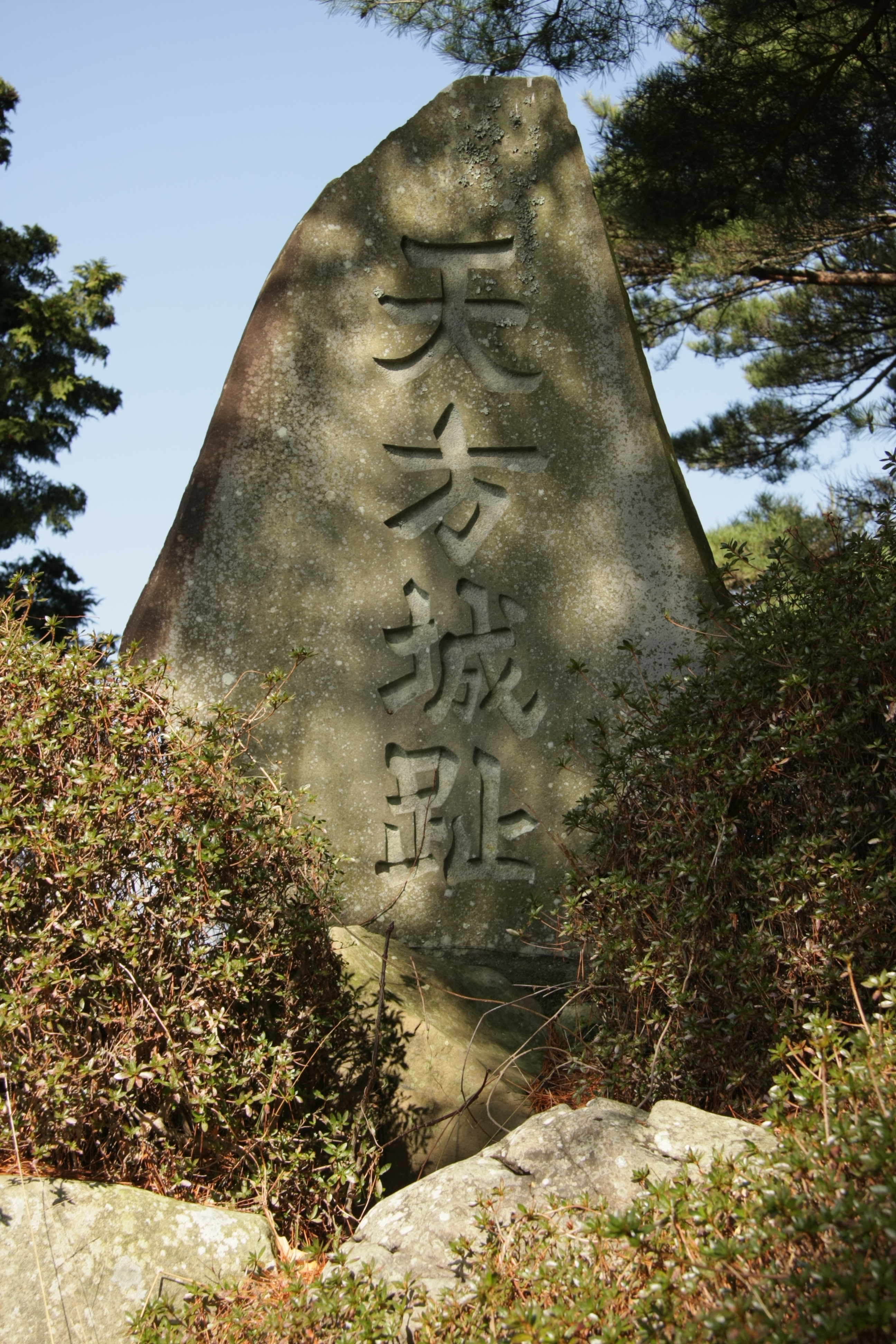 天方城趾の碑